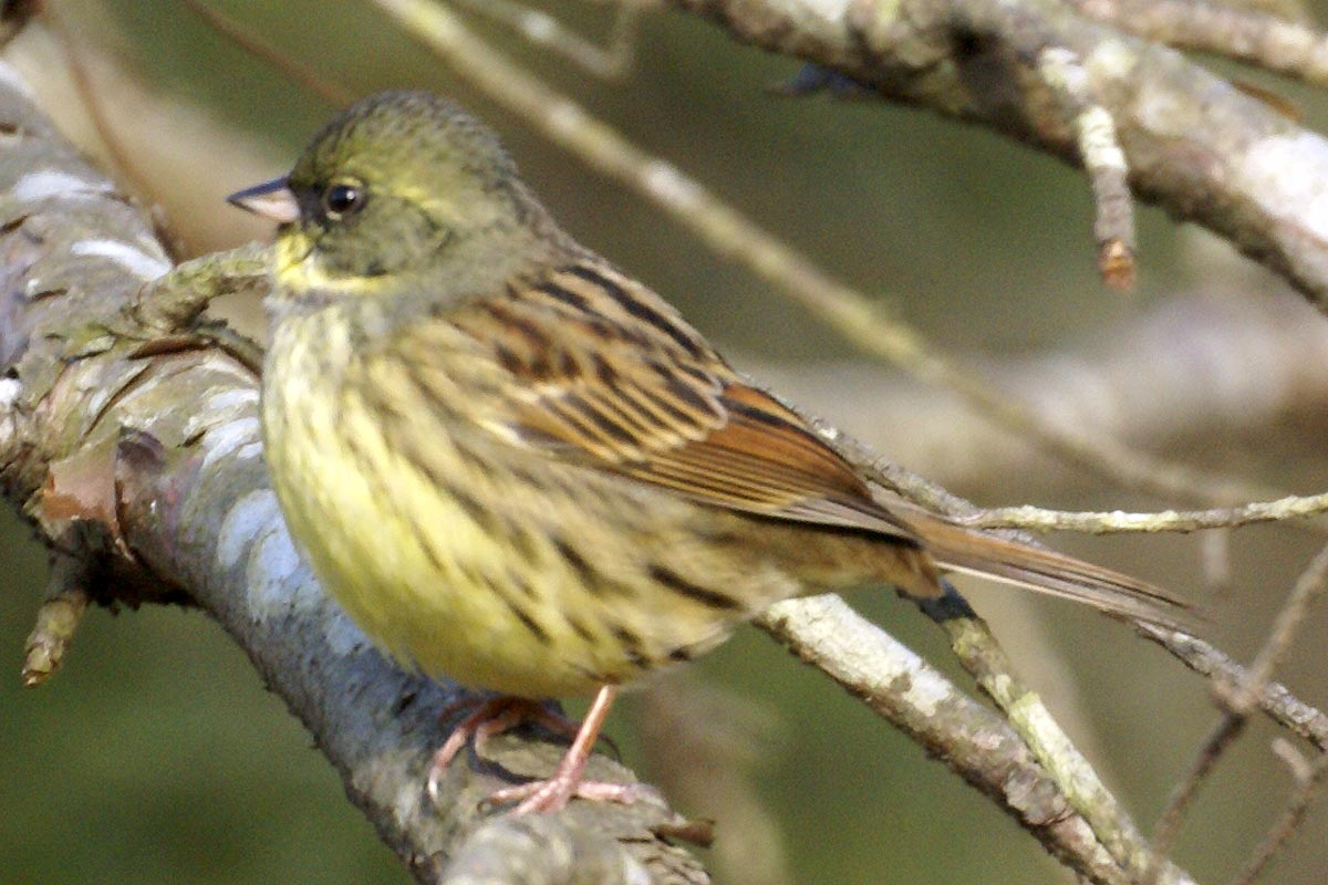 Emberiza spodocephala